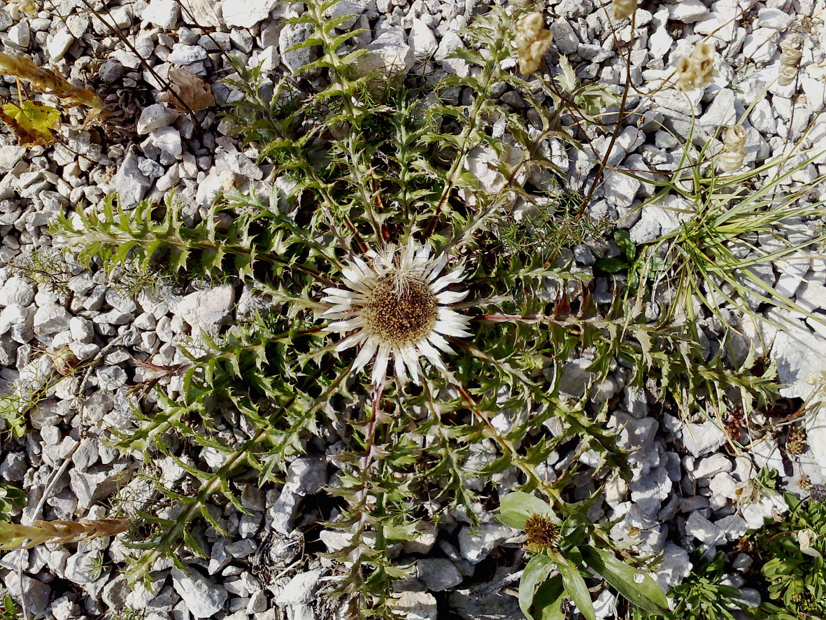 Silberdistel (Carlina acaulis) mit sternförmiger Blattrosette; Fundort: Rax-Schneeberggebiet nächst Kienthalerhütte (1.400 m)